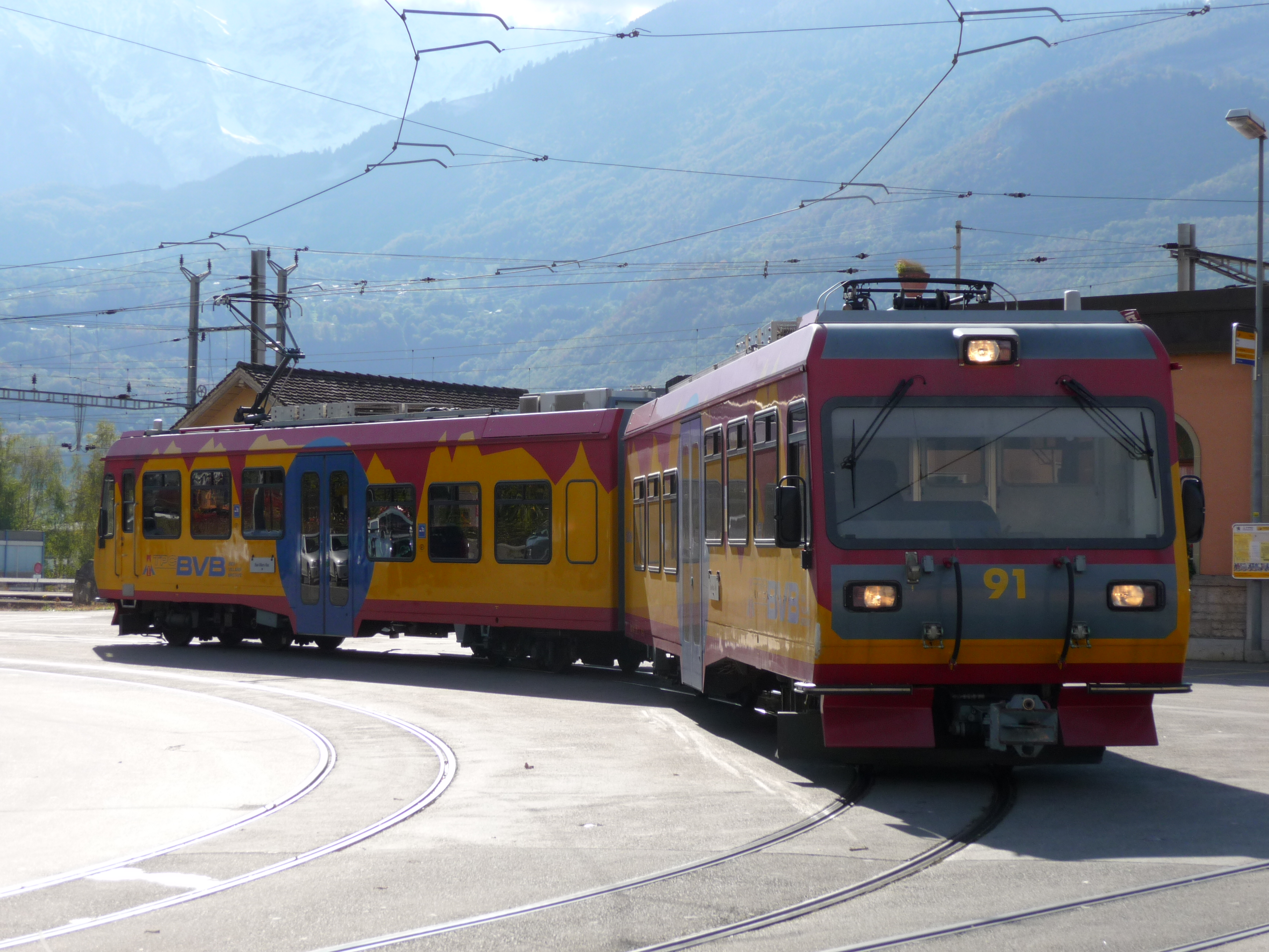 Bex-Villars-Bretaye-Bahn in Bex.